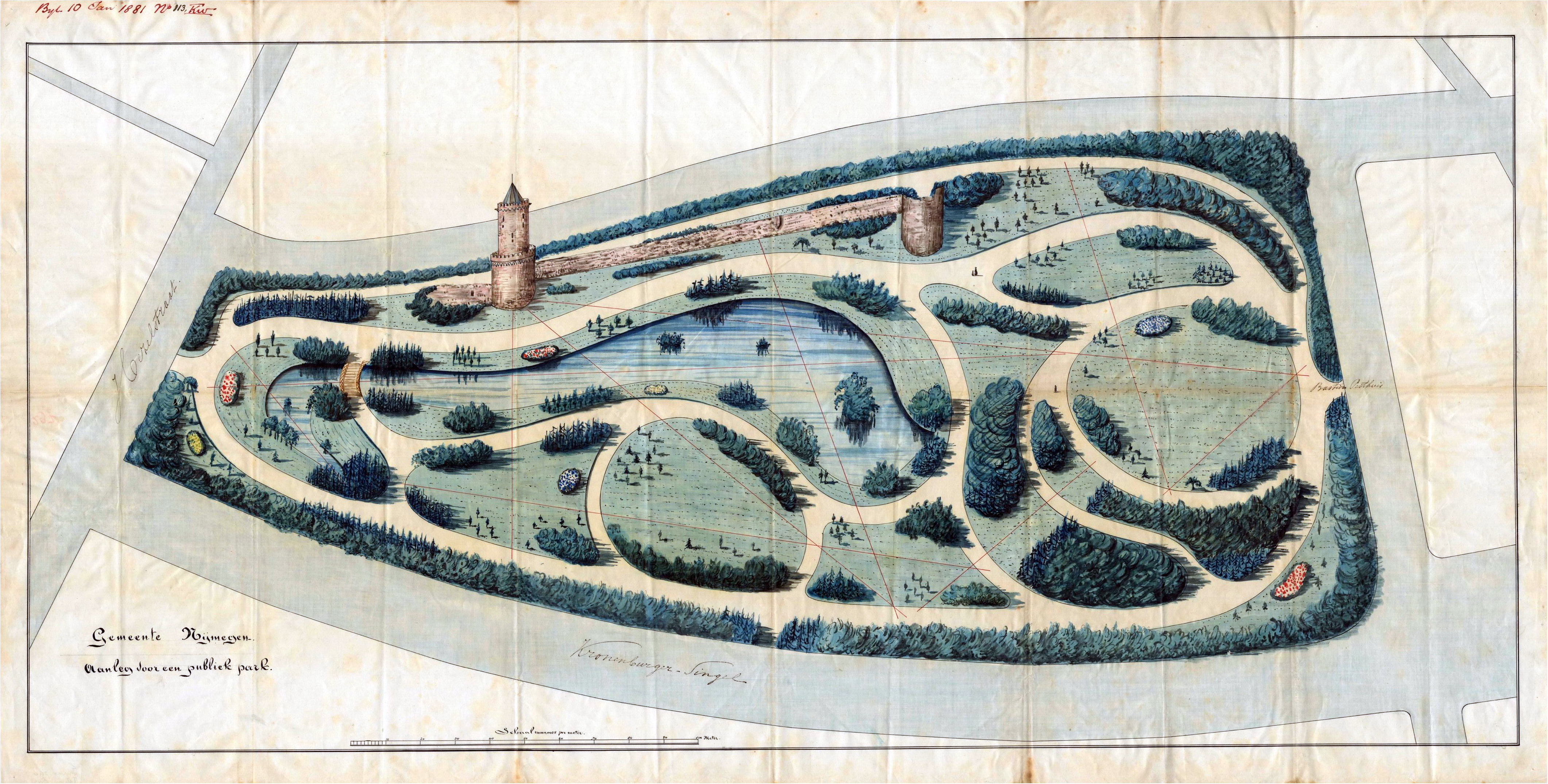 KRONENBURGERPARK: Exterieur TEKENING, ONTWERP VAN ROSSELS (1881)